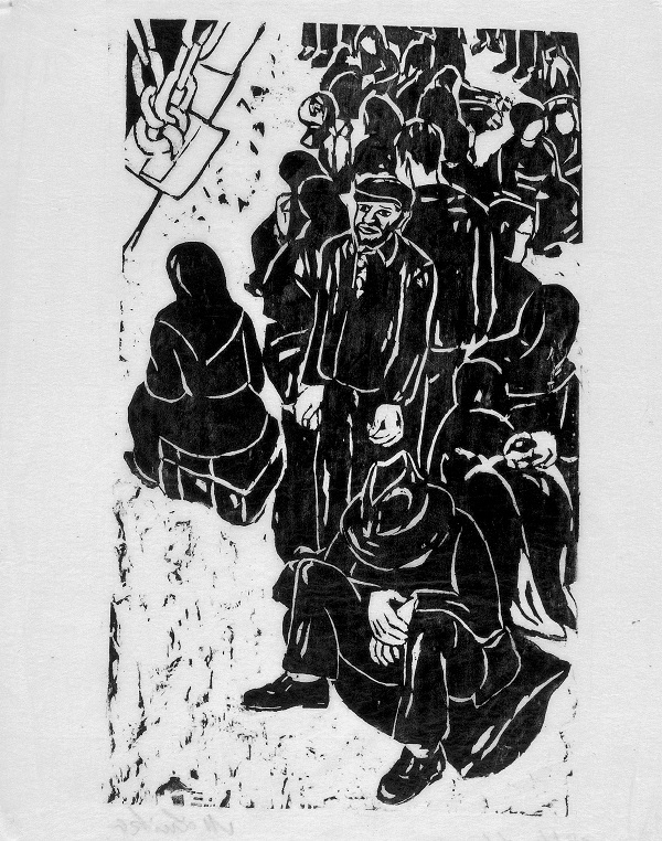 Maria Luiko Menschengruppe vor der Deportation Holzschnitt um 1938 Jüdisches Museum München